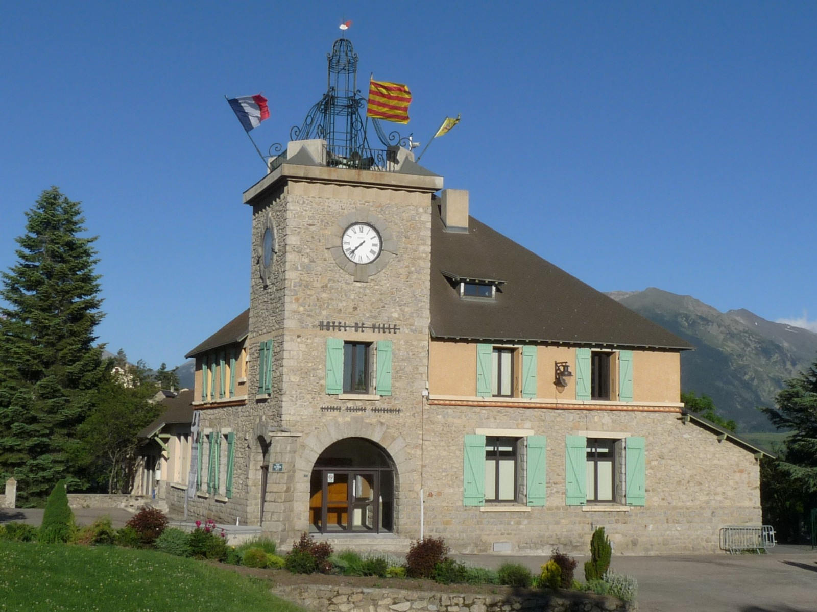 Hôtel de ville, Font-Romeu-Odeillo-Via, Pyrénées-Orientales, France